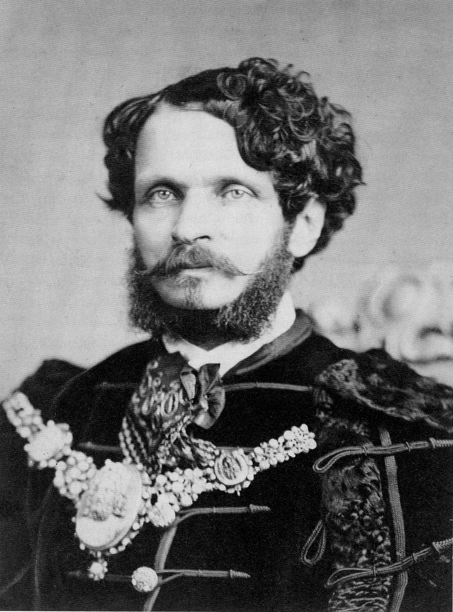 Idősebb csíkszentkirályi és krasznahorkai gróf Andrássy Gyula (Kassa, 1823. március 3. – Volosca (Fiume mellett),[2] 1890. február 18.); magyar politikus, államférfi, 1867–71-ig a Magyar Királyság miniszterelnöke, 1871–79-ig az Osztrák–Magyar Monarchia külügyminisztere, ifj. Andrássy Gyula apja.